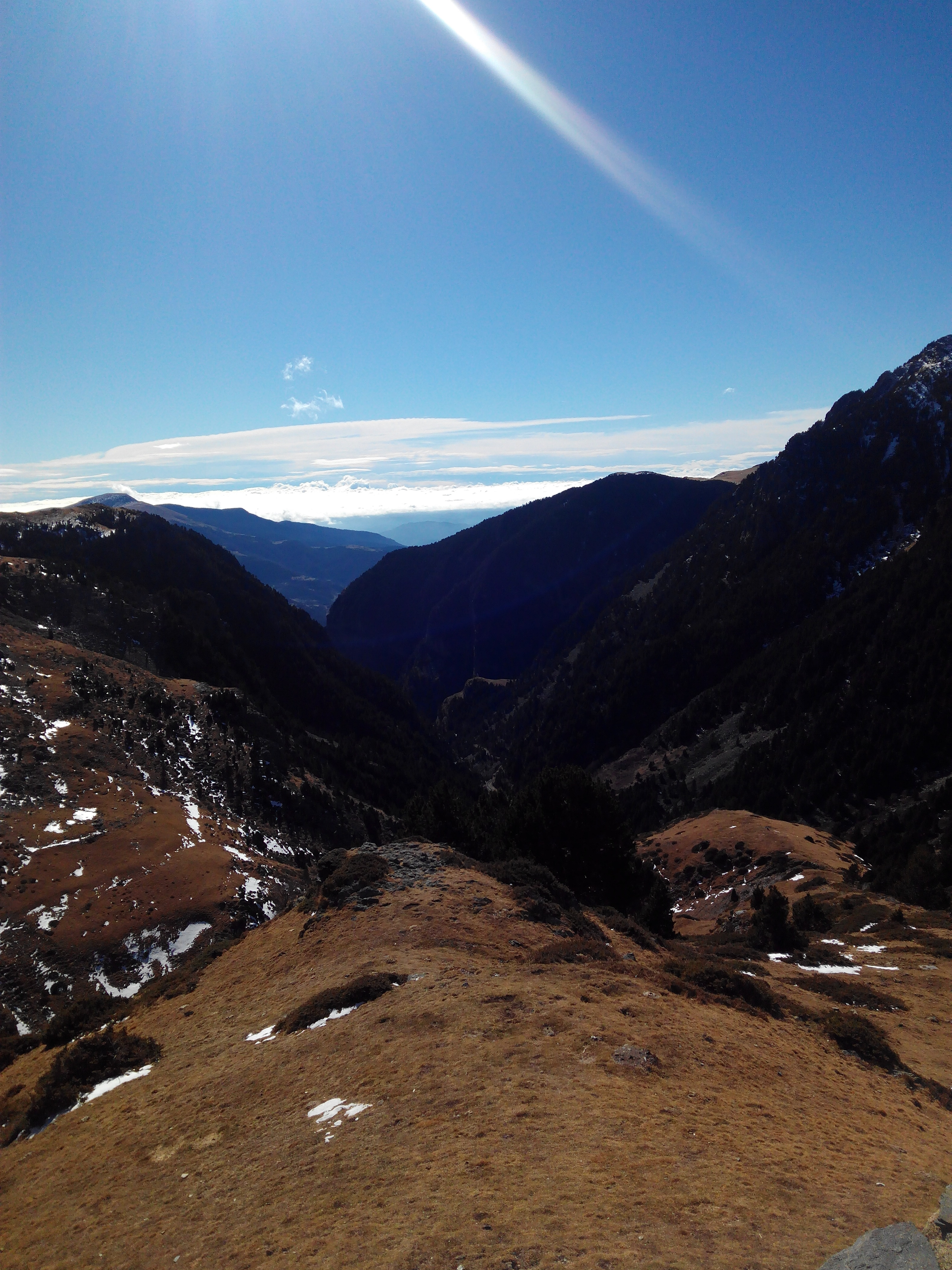 Parte alta y posterior al Valle de Nuria sin nieve durante el mes de febrero.